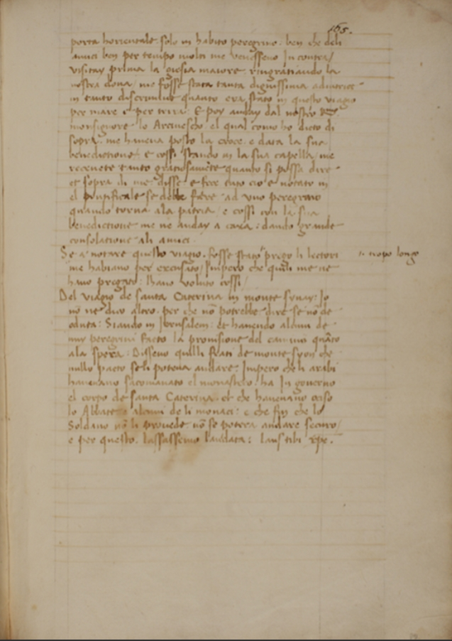 Pietro Casola, Viaggio a Gerusalemme MS. Trivulziano 141 fol. 82r